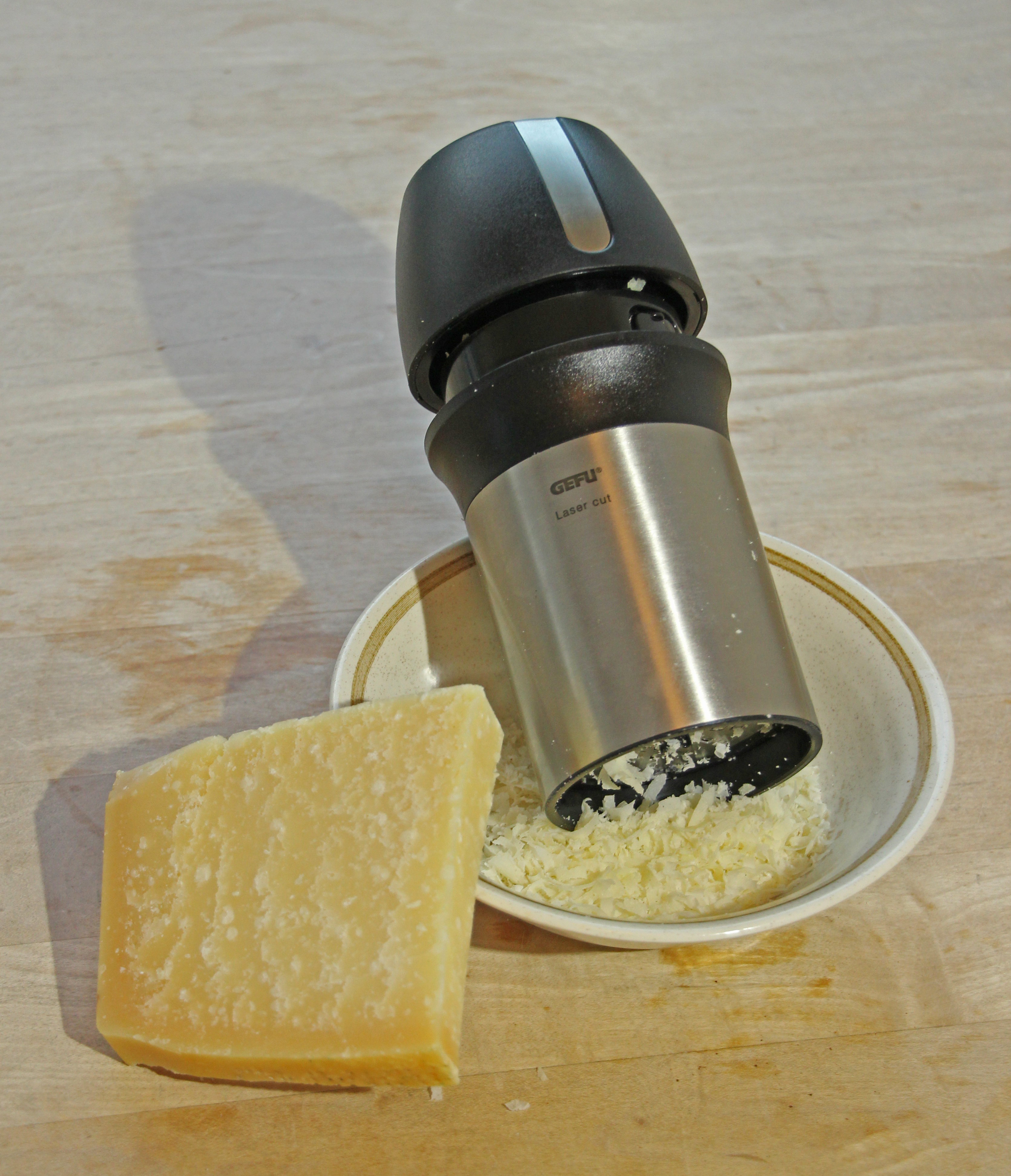 Bildinhalt: Käsereibe der Firma Gefu, Teller und Parmesankäse auf hölzerner Tischplatte Aufnahmeort: Frankfurt am Main, Deutschland